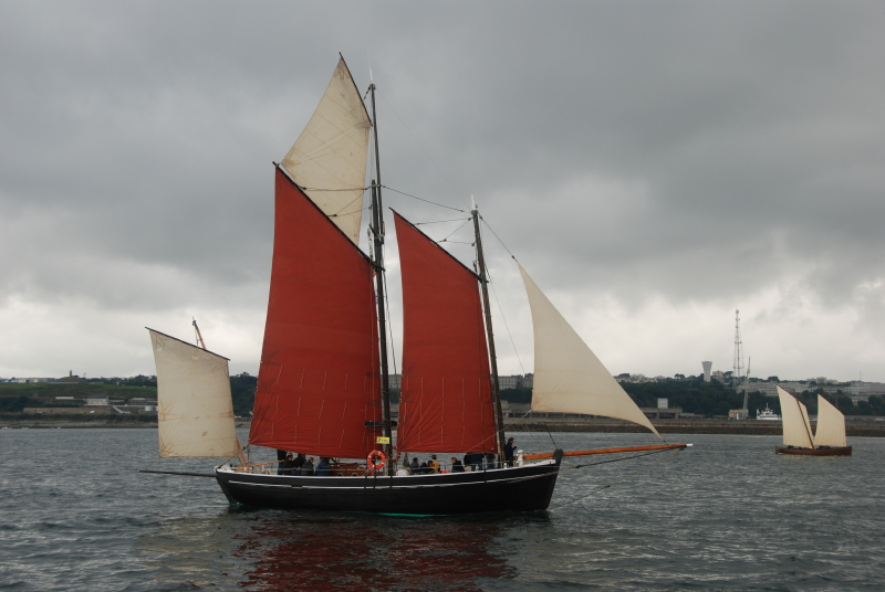 Le Neire Mâove (Barneville-Carteret) 1880 Built: Chéne, Acajou (bordés), Iroko (pont) LLP 14.00 m Displacement 27 t Sails: 180 m2 Main engine 120 pk